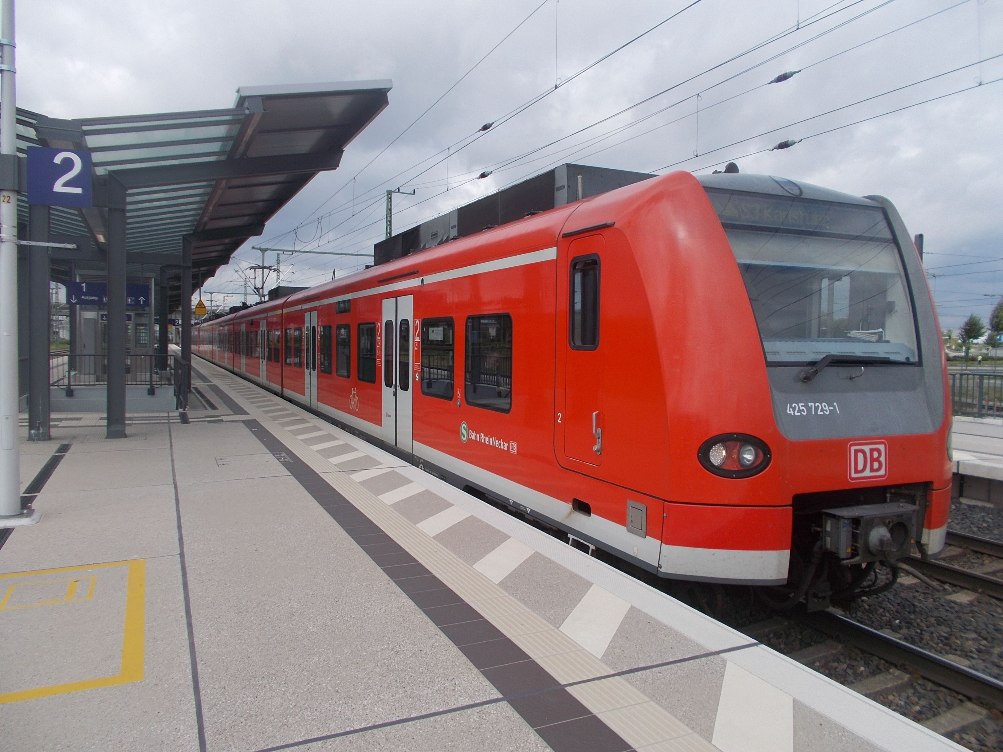 Bahnhof Mannheim ARENA/Maimarkt